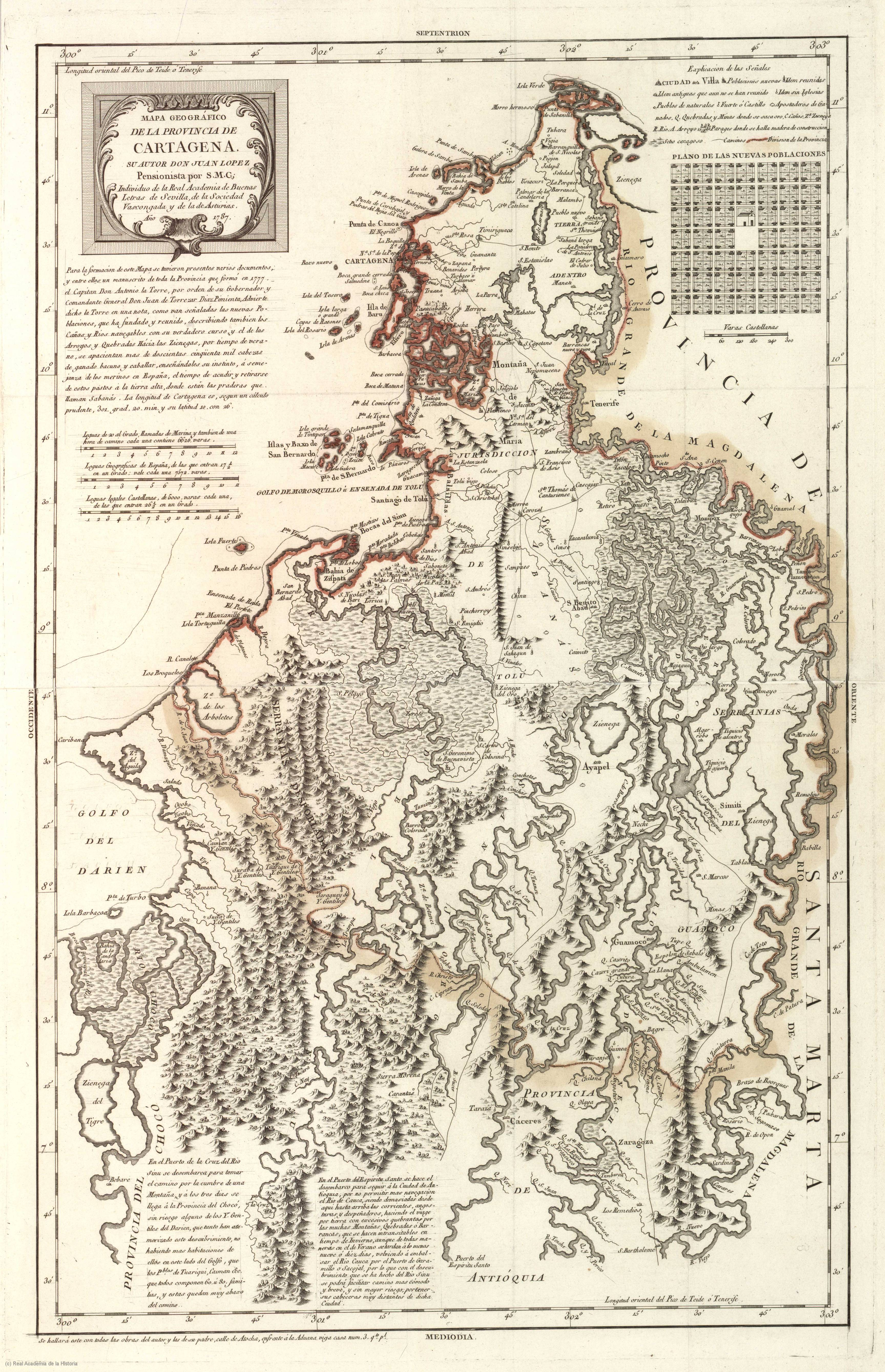 Mapa geográfico de la Provincia de Cartagena, dibujado por Don Juan López en 1787